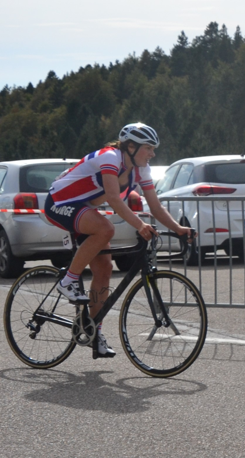 Vita Heine au chalet Reynard, dans l'ascension du Mont Ventoux, lors du Tour féminin international de l'Ardèche 2016